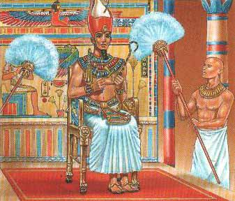 Faraón